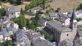 Rotonde et eglise de Meyrueis